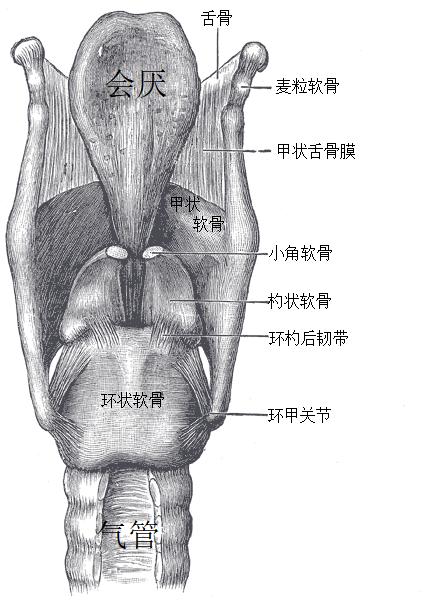 喉部韧带。后视图